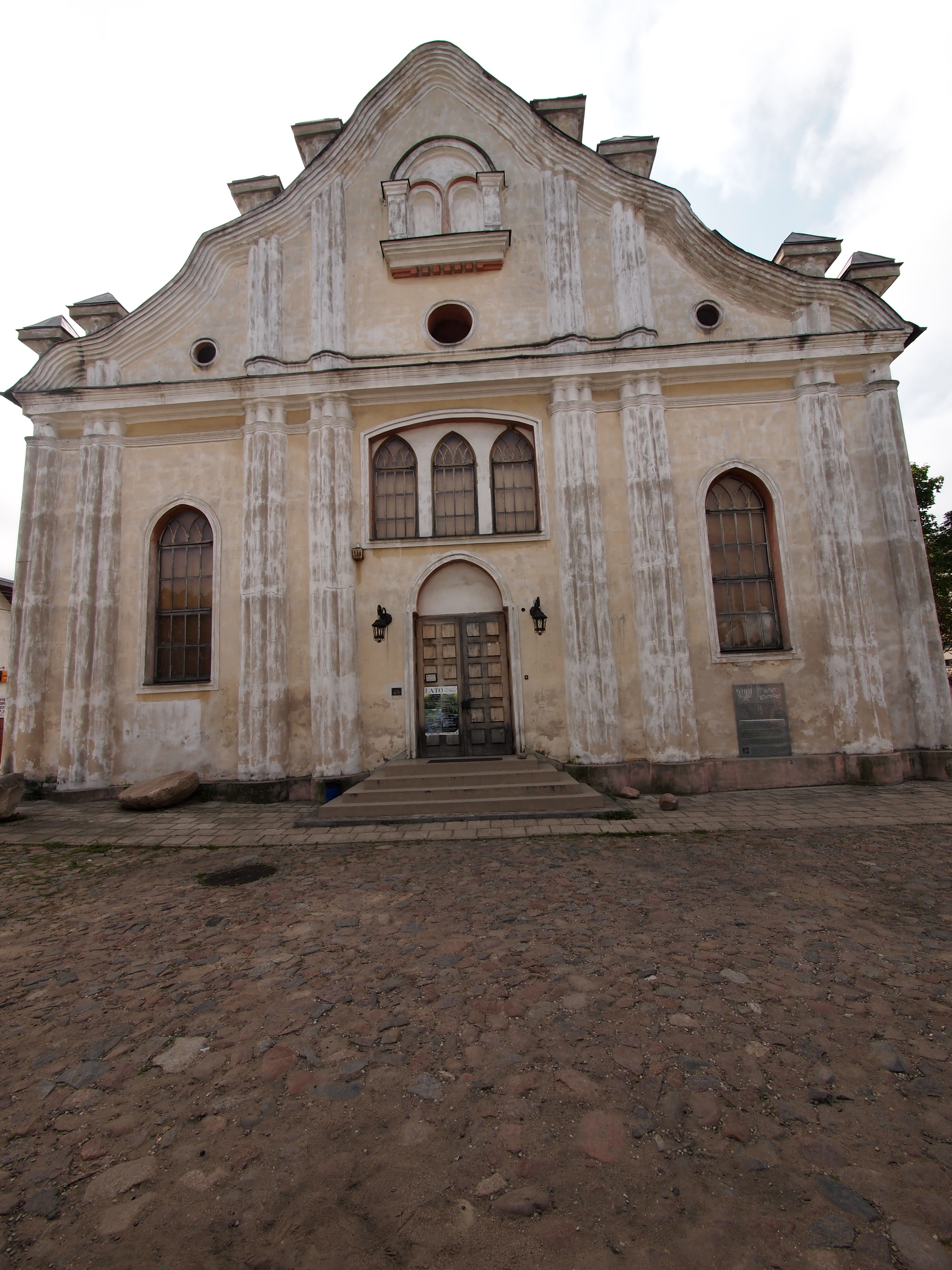 Sejny - Biała Synagoga